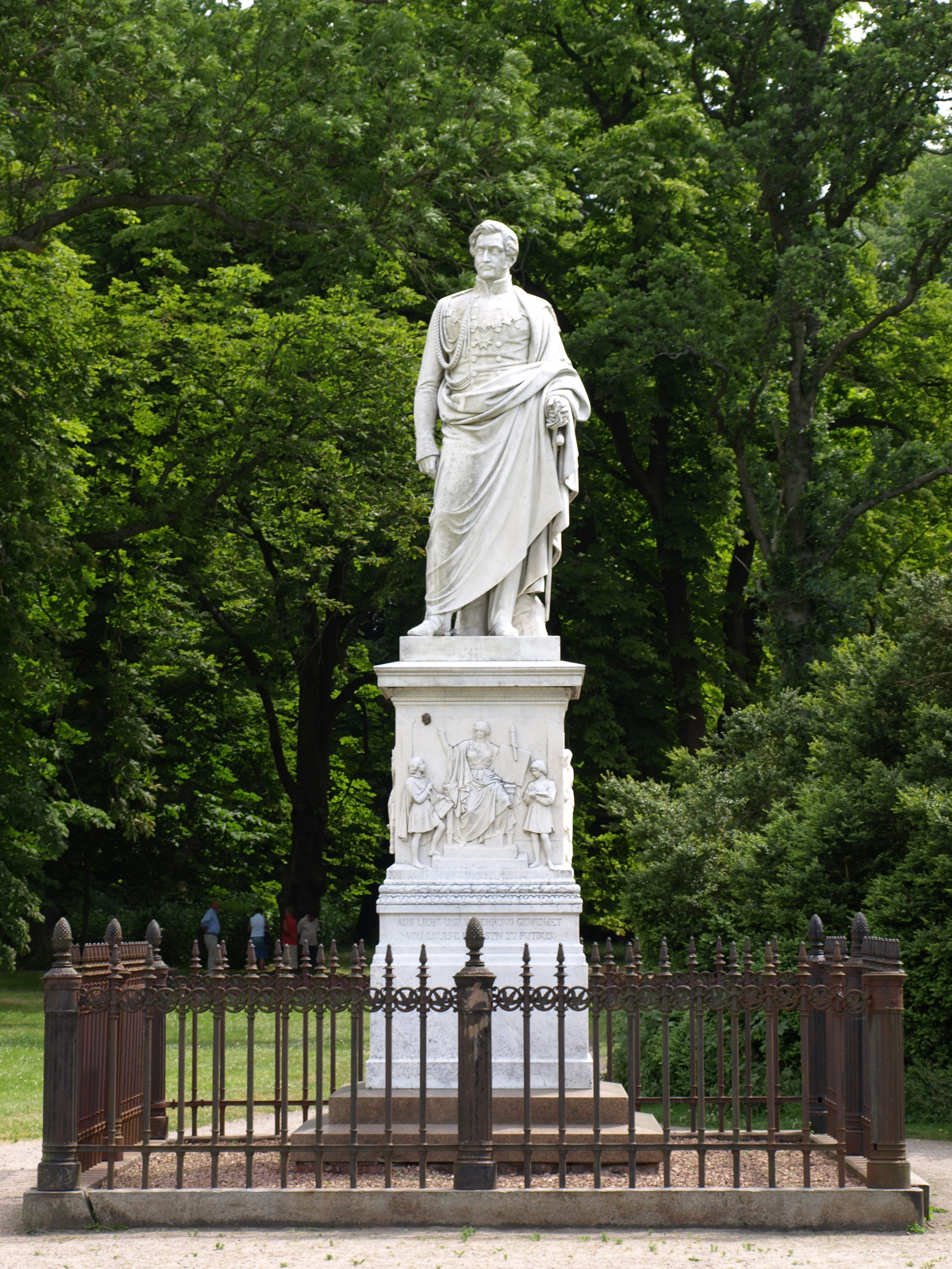 Denkmal von Wilhelm Malte Fürst zu Putbus, errichtet von Friedrich Drake 1859